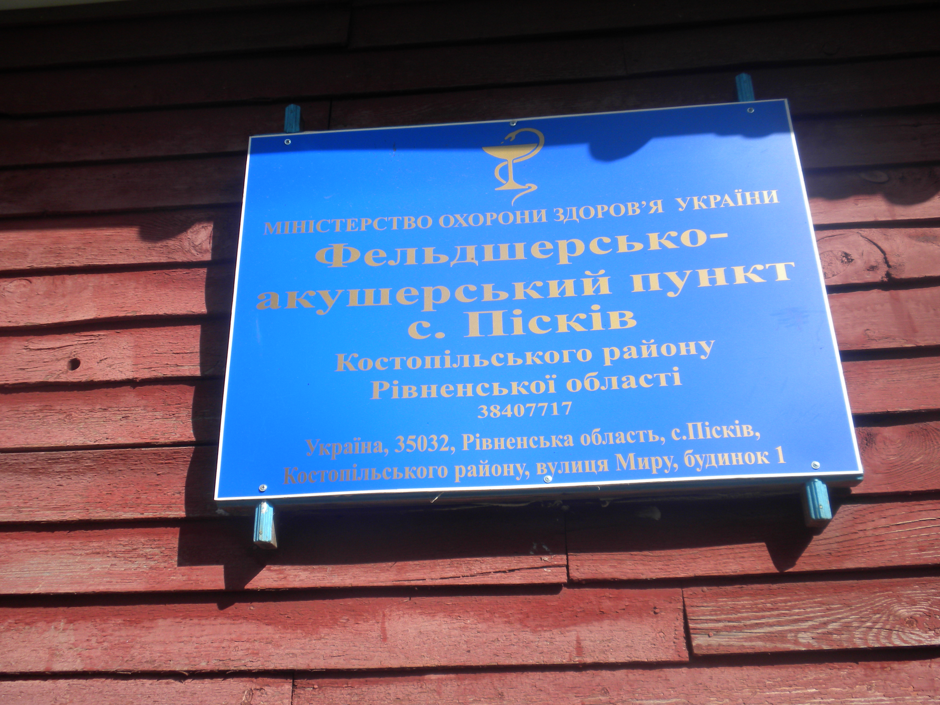 Фельдшерсько-акушерський пункт